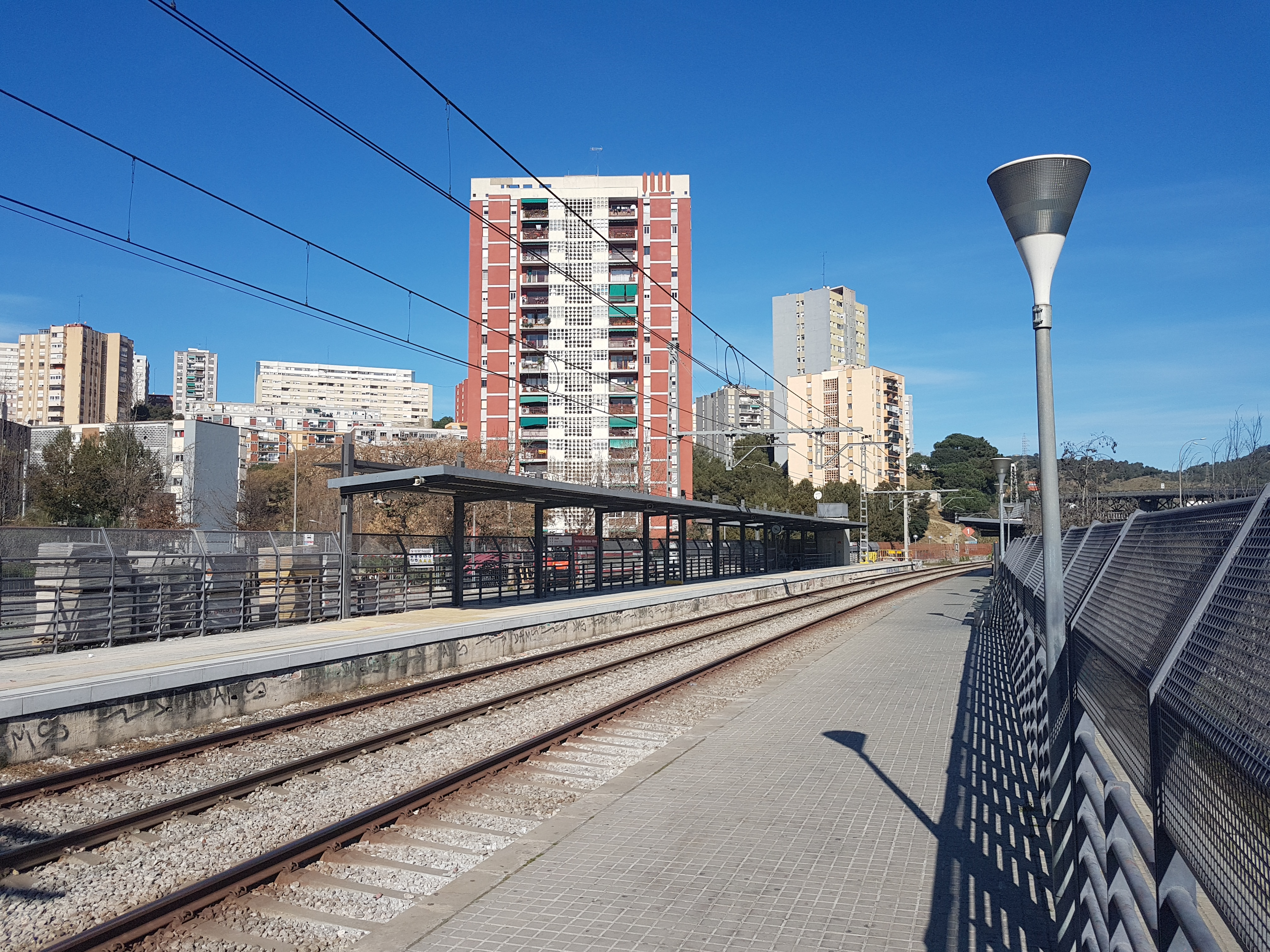 L'estació de la Torre del Baró de la línia Barcelona-Manresa